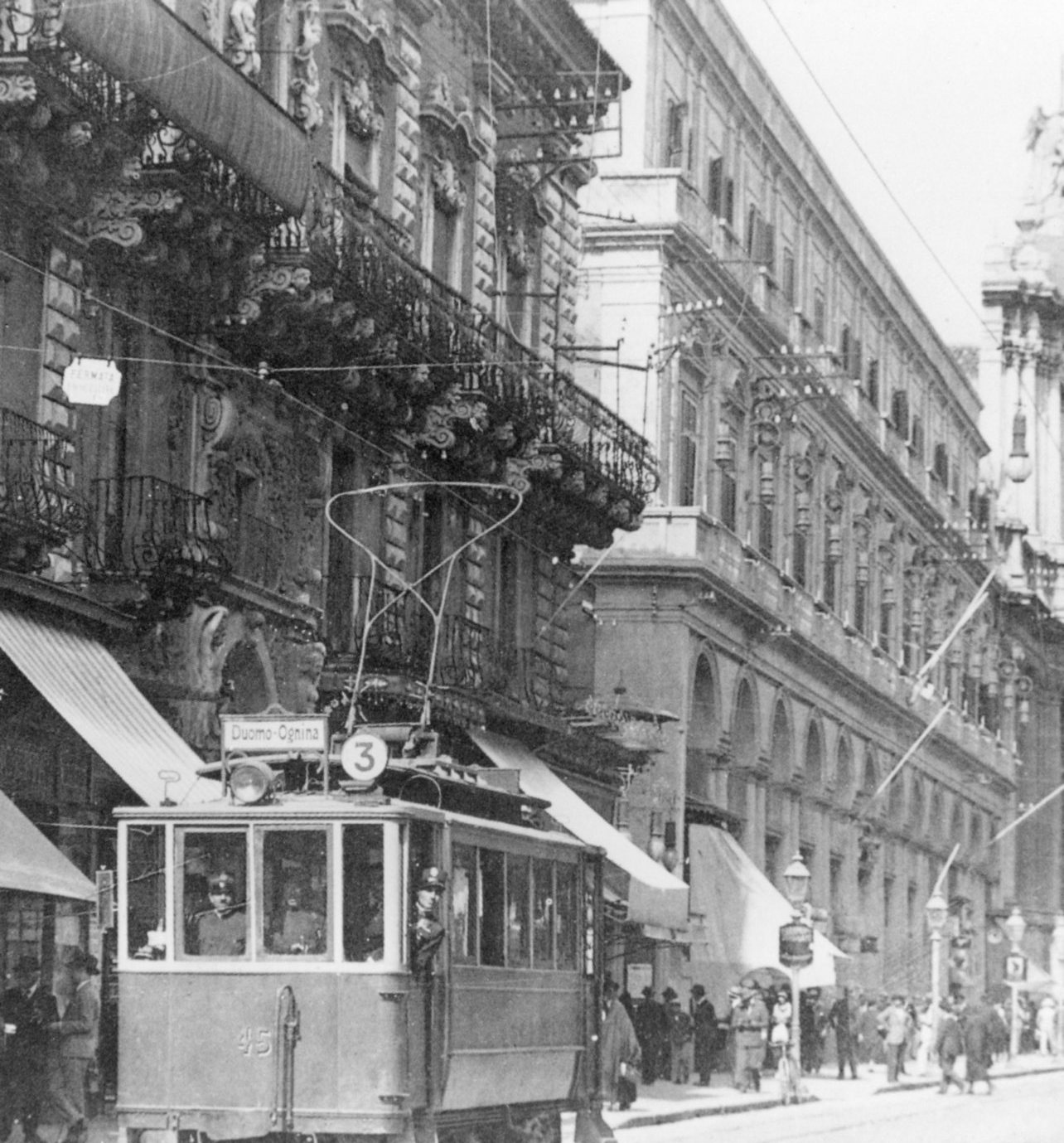 Tram di Catania della linea 3 in via Etnea (periodo prima guerra mondiale)